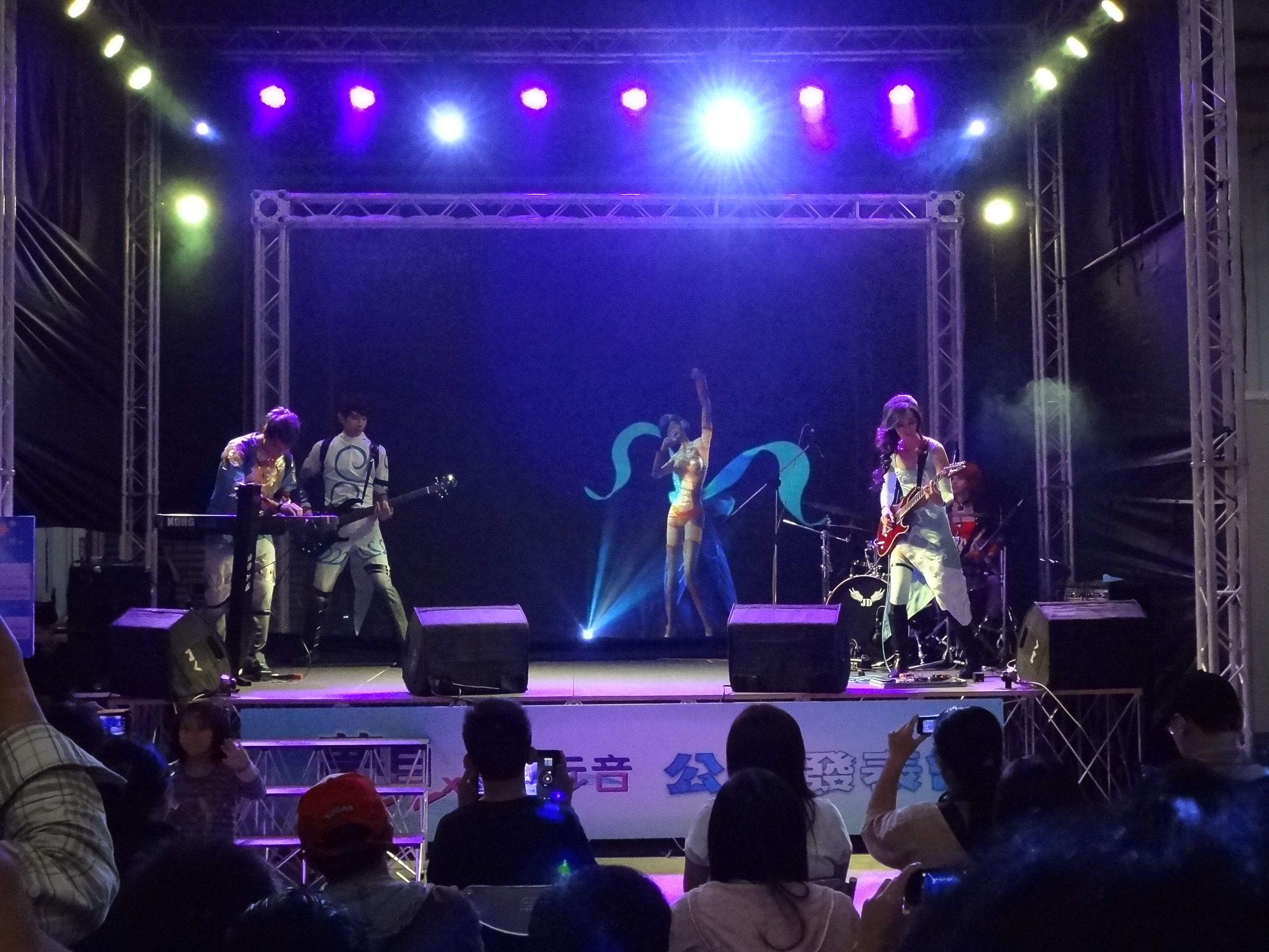 2013臺中動漫節浮空投影特別舞臺，臺灣原創動畫電影《夢見》「進化元音浮空投影演唱會」。女主角Mida以浮空投影3D CG的模樣登上舞台，小彤、東東、顏虹、阿泰由真人樂團cosplay現場演奏樂曲。